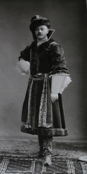 Евгений Александрович Гернгросс, командир лейб-гвардии Конного полка.